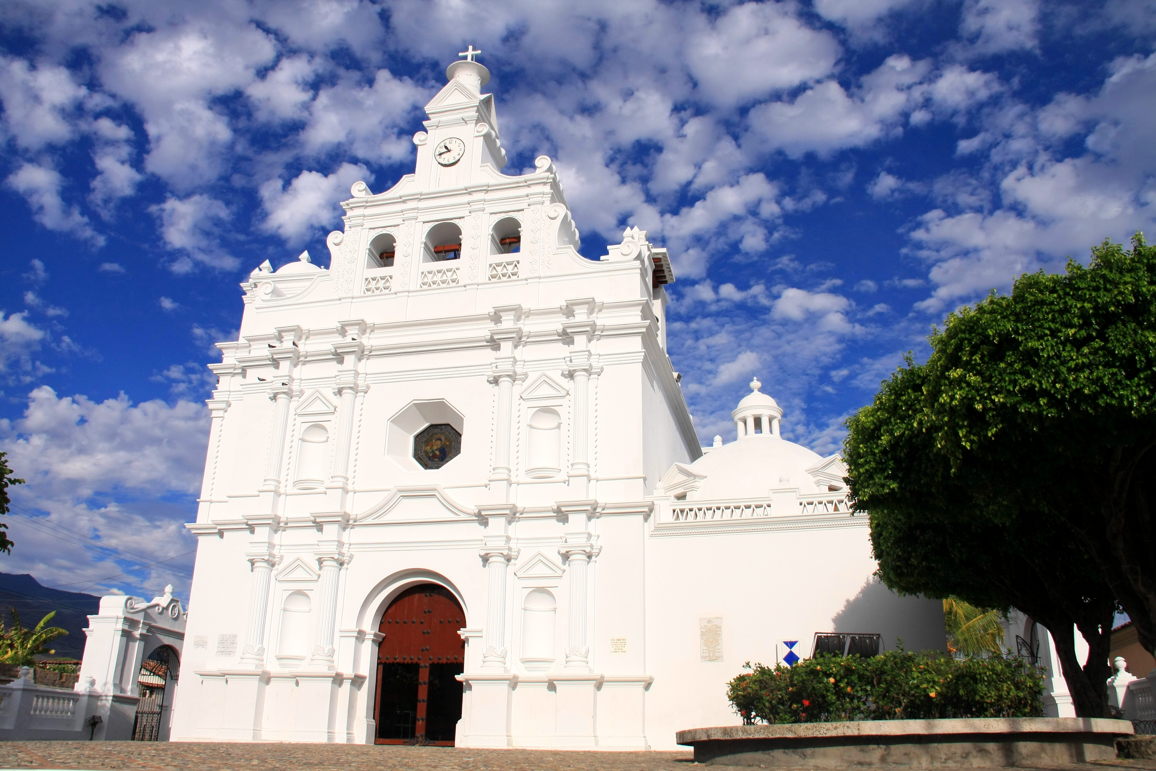 Iglesia Colonial Metapan